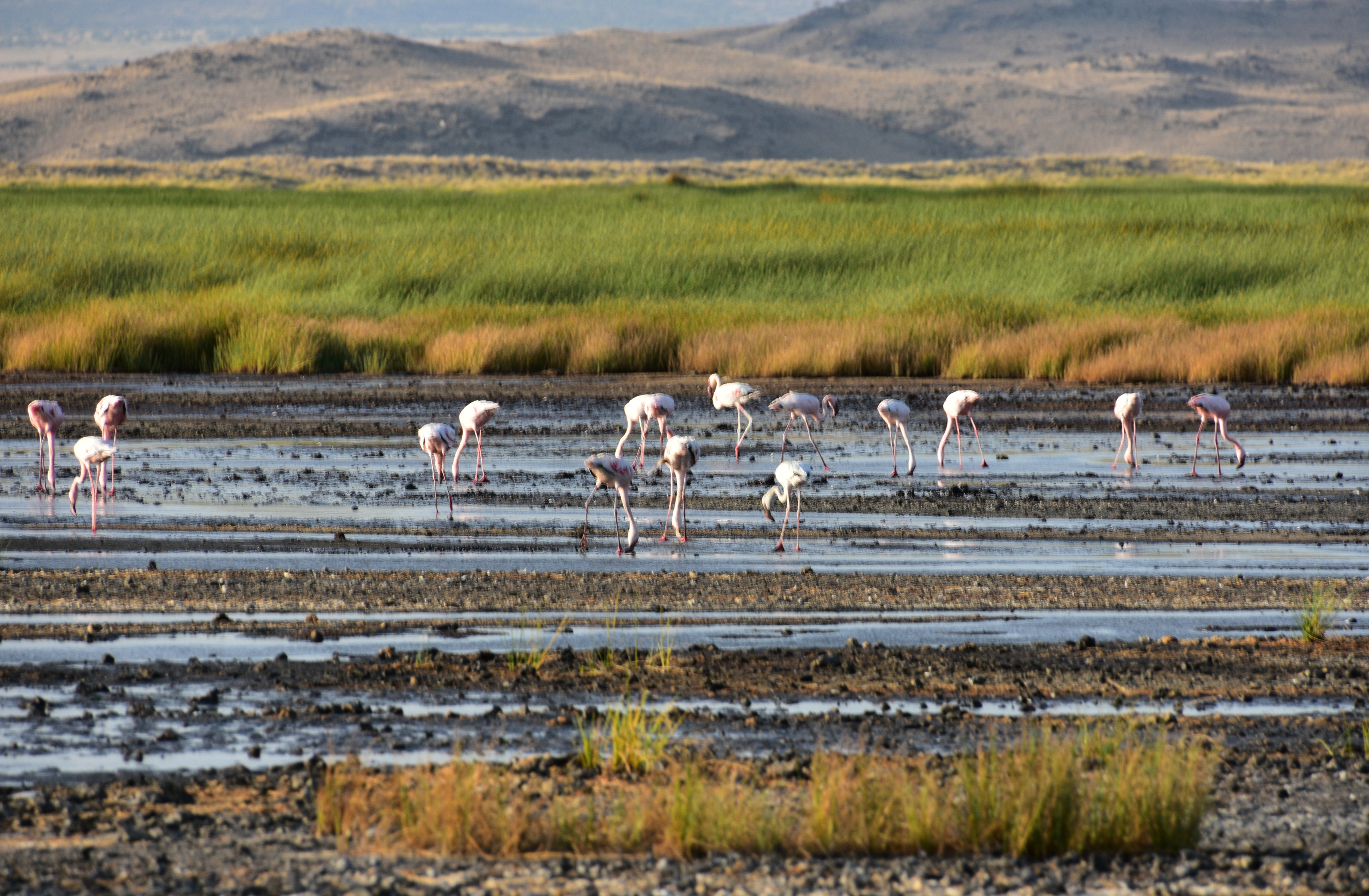 Flamingos at Lake Natron (9)